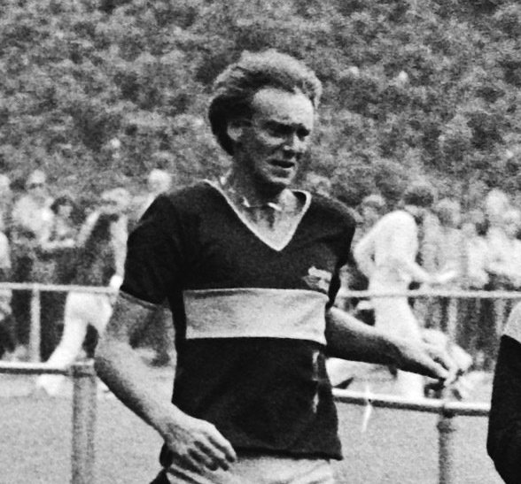 Collectie / Archief : Fotocollectie Anefo Reportage / Serie : Opnamen AVRO-TV "Sterrenslag" in Enschede Beschrijving : v.l.n.r. H. van den Bergh , S. Faber , Tom Collins , Anne van Egmond Datum : 14 augustus 1980 Locatie : Enschede, Overijssel Trefwoorden : hardlopen, televisieprogramma's Persoonsnaam : Bergh, H. van den, Collins, Tom, Egmont, Anne van, Faber, S. Fotograaf : Dijk, Hans van / Anefo Auteursrechthebbende : Nationaal Archief Materiaalsoort : Negatief (zwart/wit) Nummer archiefinventaris : bekijk toegang 2.24.01.05 Bestanddeelnummer : 930-9654